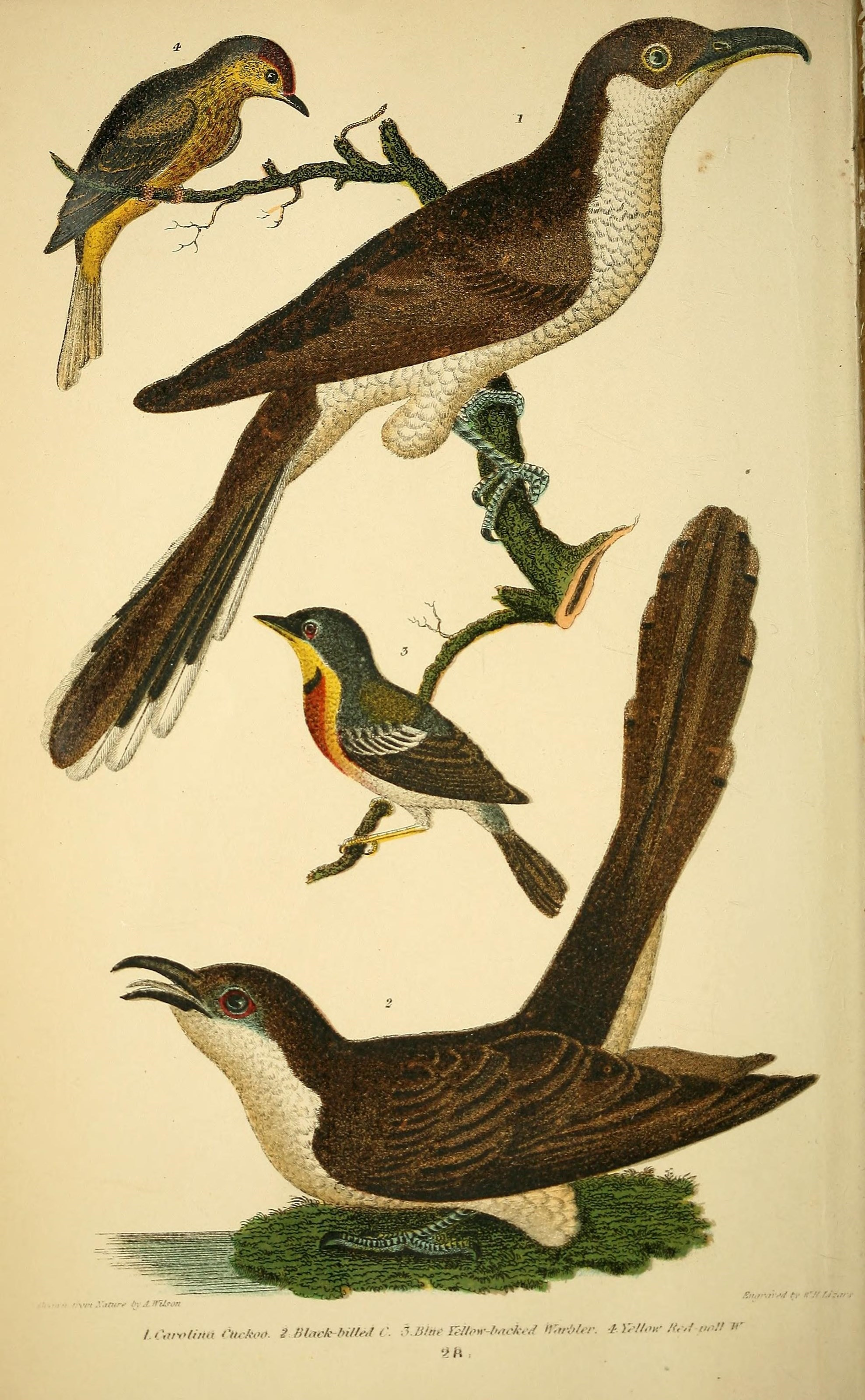 LCaroliM Cttckoo. 3 Slack-tnltel C 3J3btt ISttorJmckeJ *Krri.ler. * Kilo*- /M